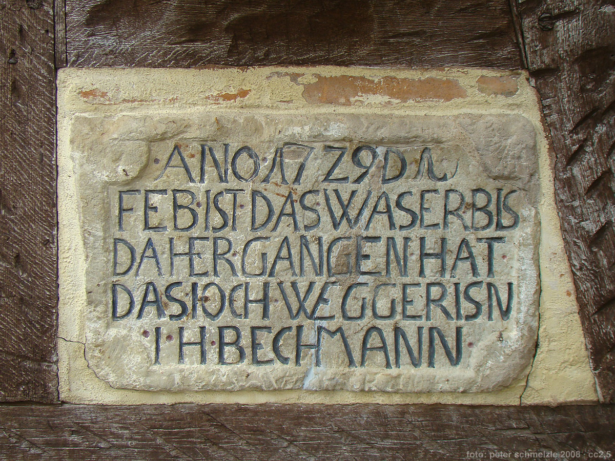 Historische Hochwassermarke beim ehem. Würzburger Amtshaus in Widdern